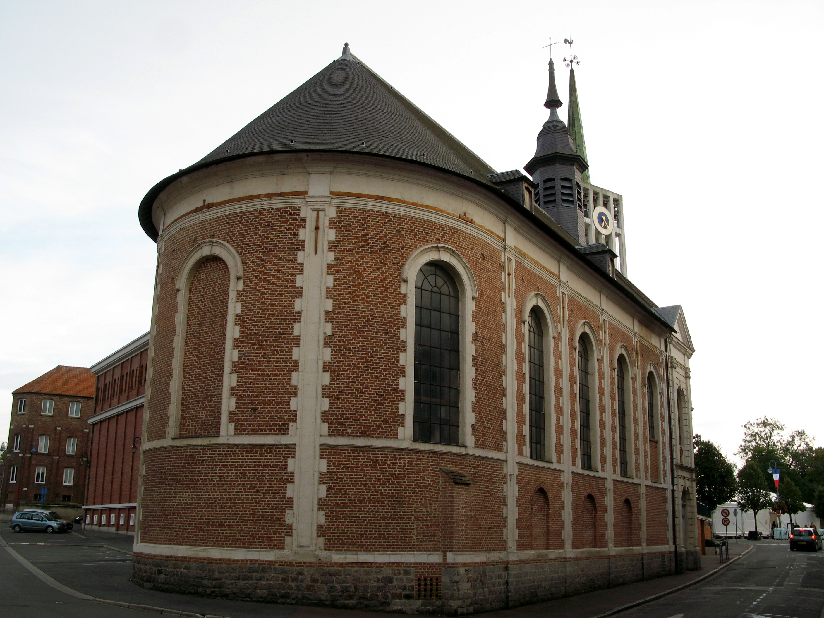 Saint-Pol-sur-Ternoise (Pas-de-Calais, France) - La Chapelle des Sœurs Noires abrite désormais le Musée municipal. On remarque, dans l'alignement du petit clocheton de l'édifice, le clocher moderne de l'église Saint-Paul. .